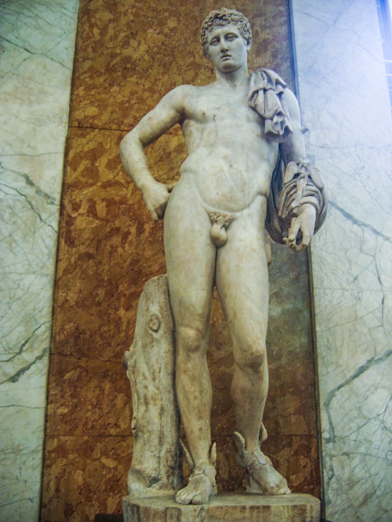 British Museum, London : Hermes Farnèse, copie romaine du IIe siècle